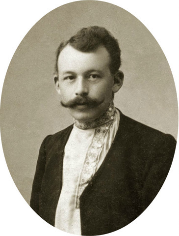 Заседатель дворянской опеки Елецкого уезда, заведующий 11-м (Афанасьевским) военно-конским участком Е. А. Бахтеяров.